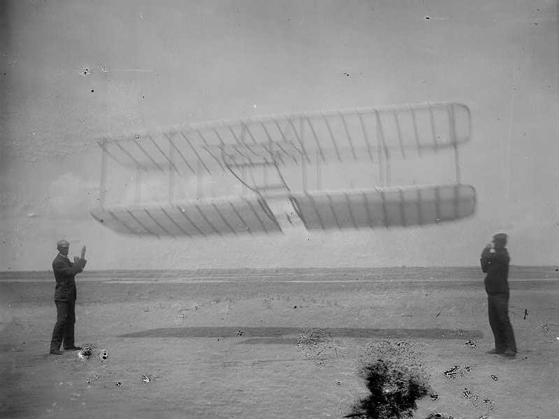 Wright Glider